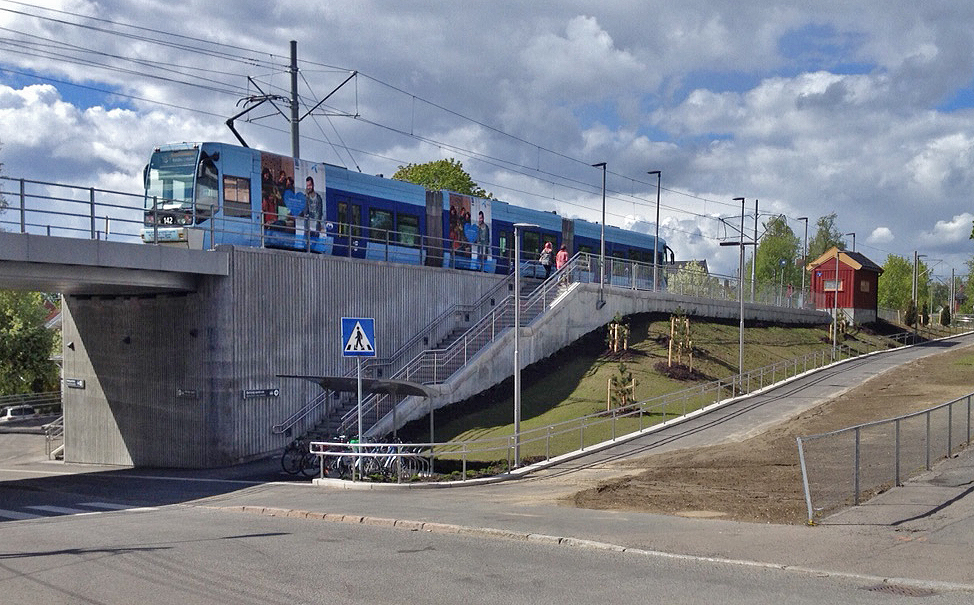 Sæter trikkeholdeplass i 2015, etter ombygging, sett fra Nordstrandsveien. Ny trikkebru over Nordstrandsveien i venstre bildekant.